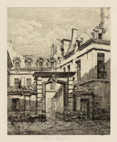 Hôtel Lesdiguières vers 1866 Niel Gabrielle Marie